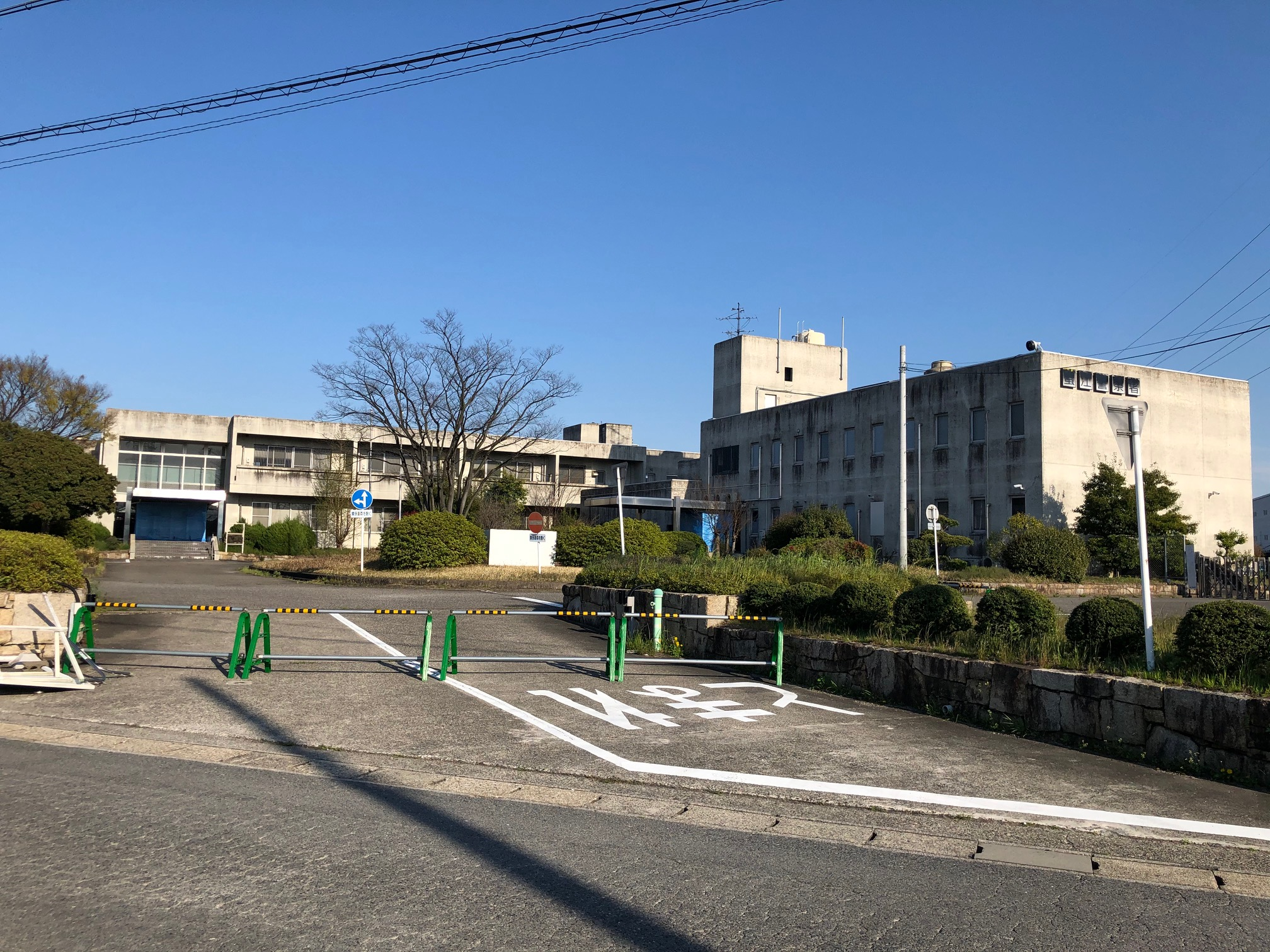 建替に伴い使用していた仮庁舎（旧・愛知県農業総合試験場）。現在は閉鎖。